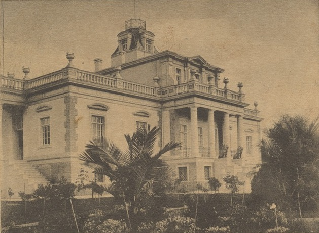 Palacio de La Circasiana, fachada este. Fotografía del estudio de José Domingo Lasso (1910).